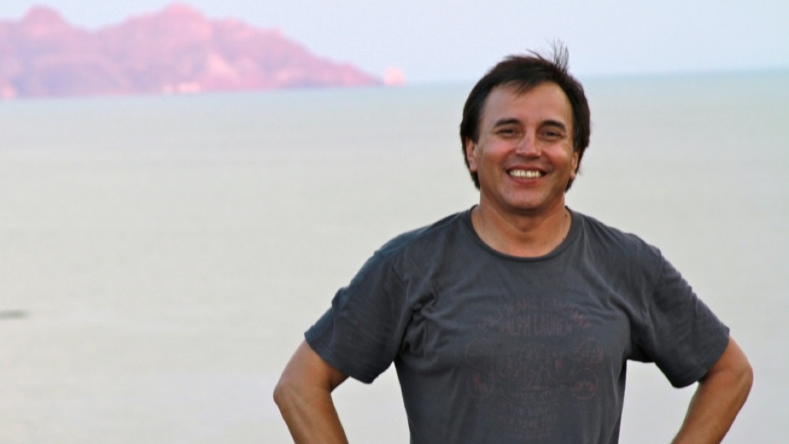 Foto tomada en San Carlos, Sonora